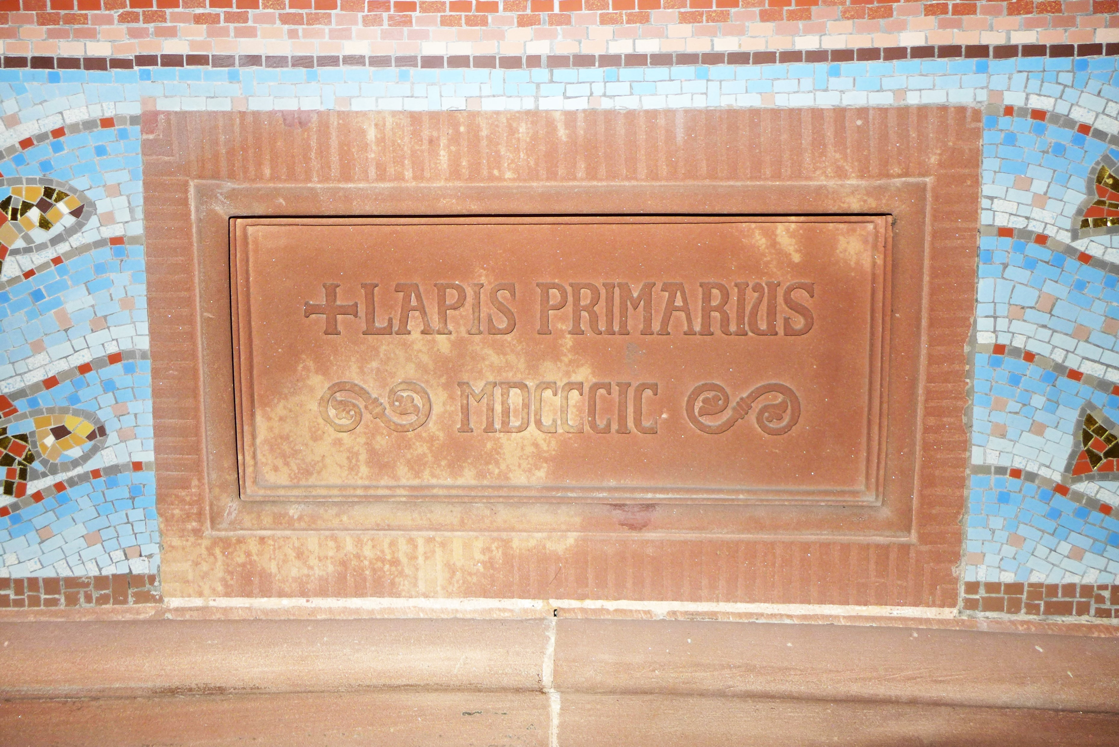 St. Luitwin (Mettlach), Grundstein